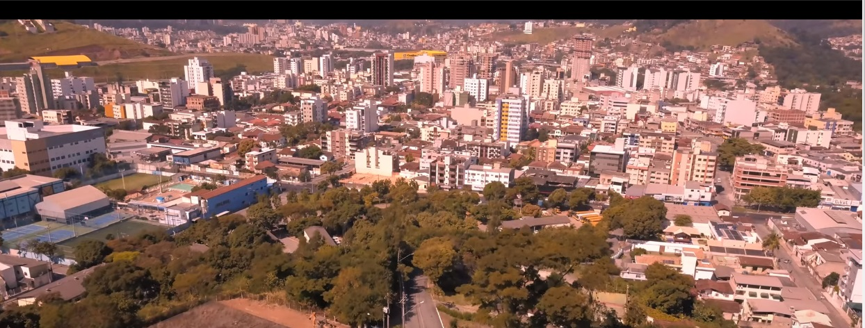 Skyline da cidade de Ipatinga